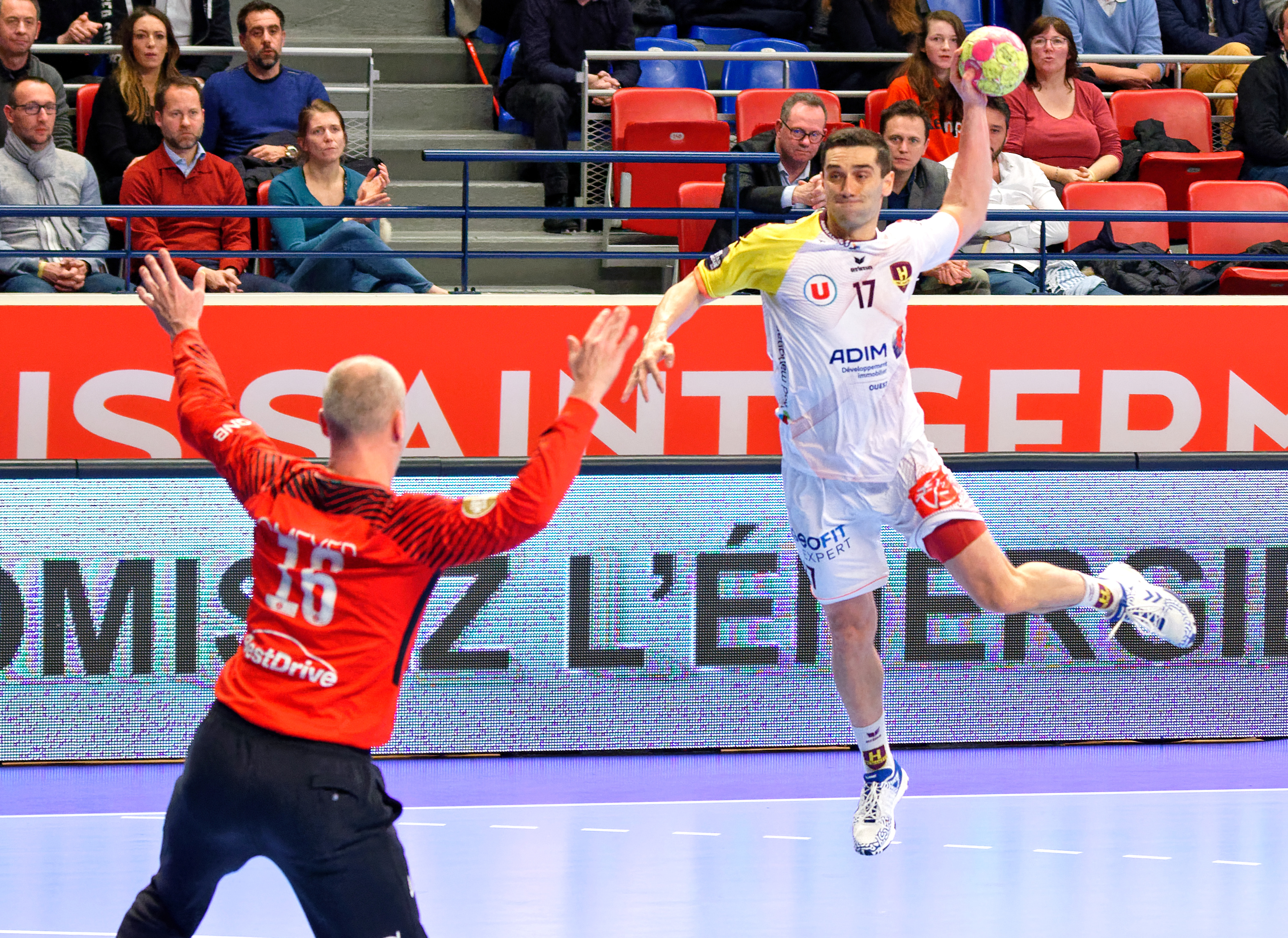 Quart de finale de la Coupe de la Ligue entre le PSG et le HBC Nantes. A Coubertin, le 14 décembre 2017.